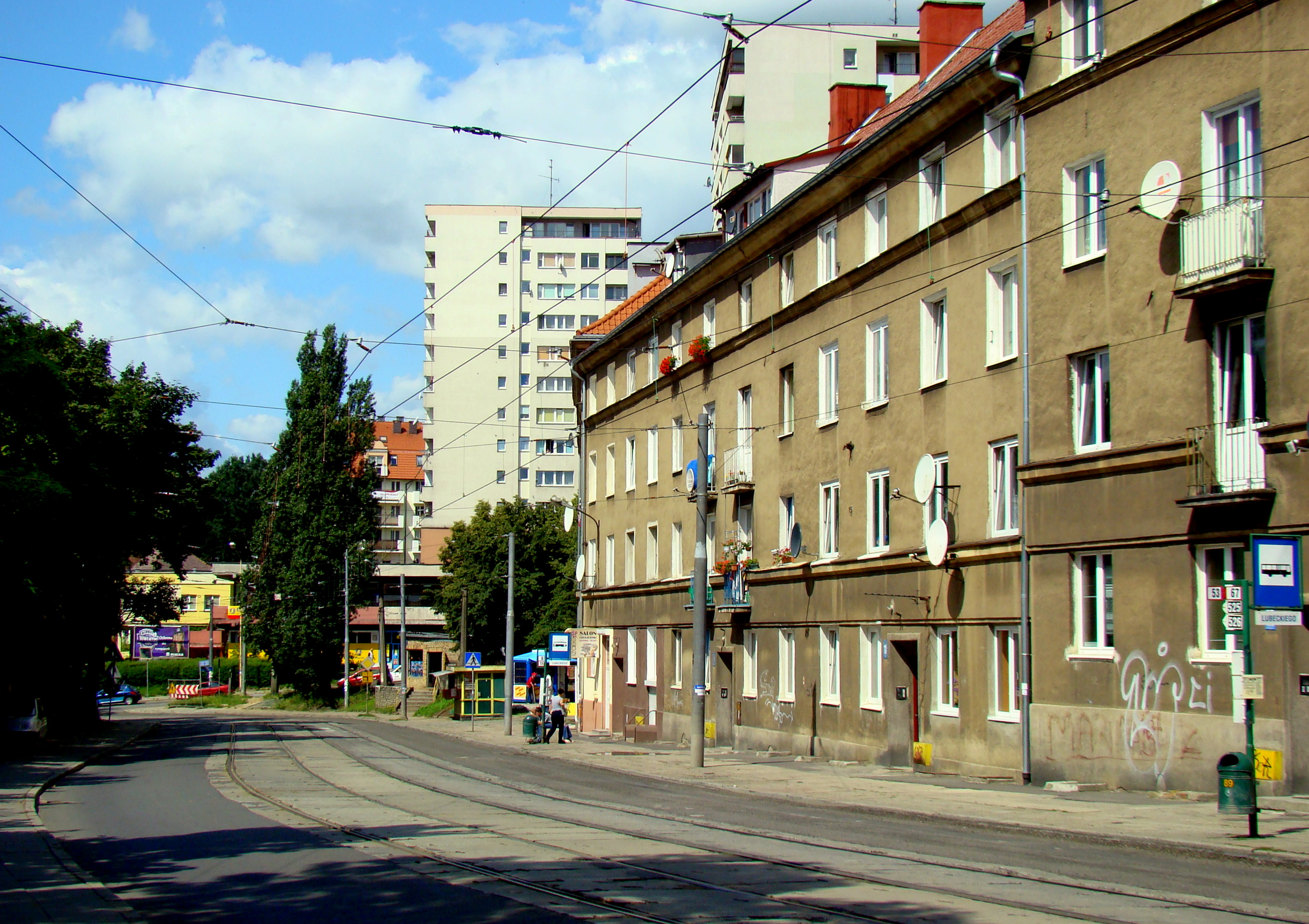 Szczecin-Drzetowo (ul. Lubeckiego), Polska